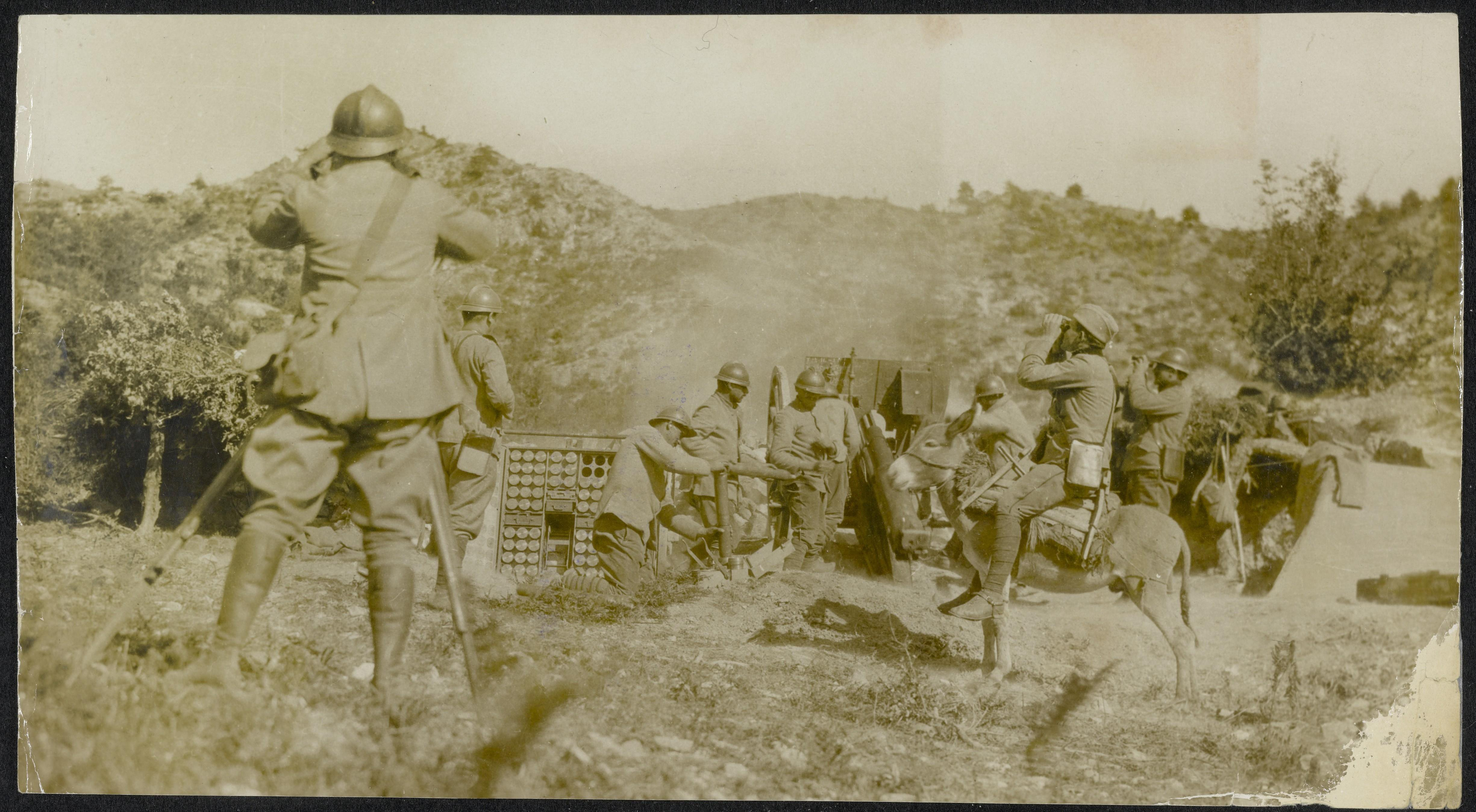 Collectie / Archief : Fotocollectie Eerste Wereldoorlog Reportage / Serie : With the Serbians on the Salonika front Beschrijving : Serbian artillery in action Annotatie : Met de Serviërs aan het Saloniki front. Servische artillerie in actie Datum : december 1917 Locatie : Griekenland, Saloniki Trefwoorden : bominslagen, eerste wereldoorlog, fronten, militairen Fotograaf : Central News Auteursrechthebbende : Public Domain logo Materiaalsoort : Foto (zwart/wit) Nummer archiefinventaris : bekijk toegang 2.24.09 Bestanddeelnummer : 158-0702